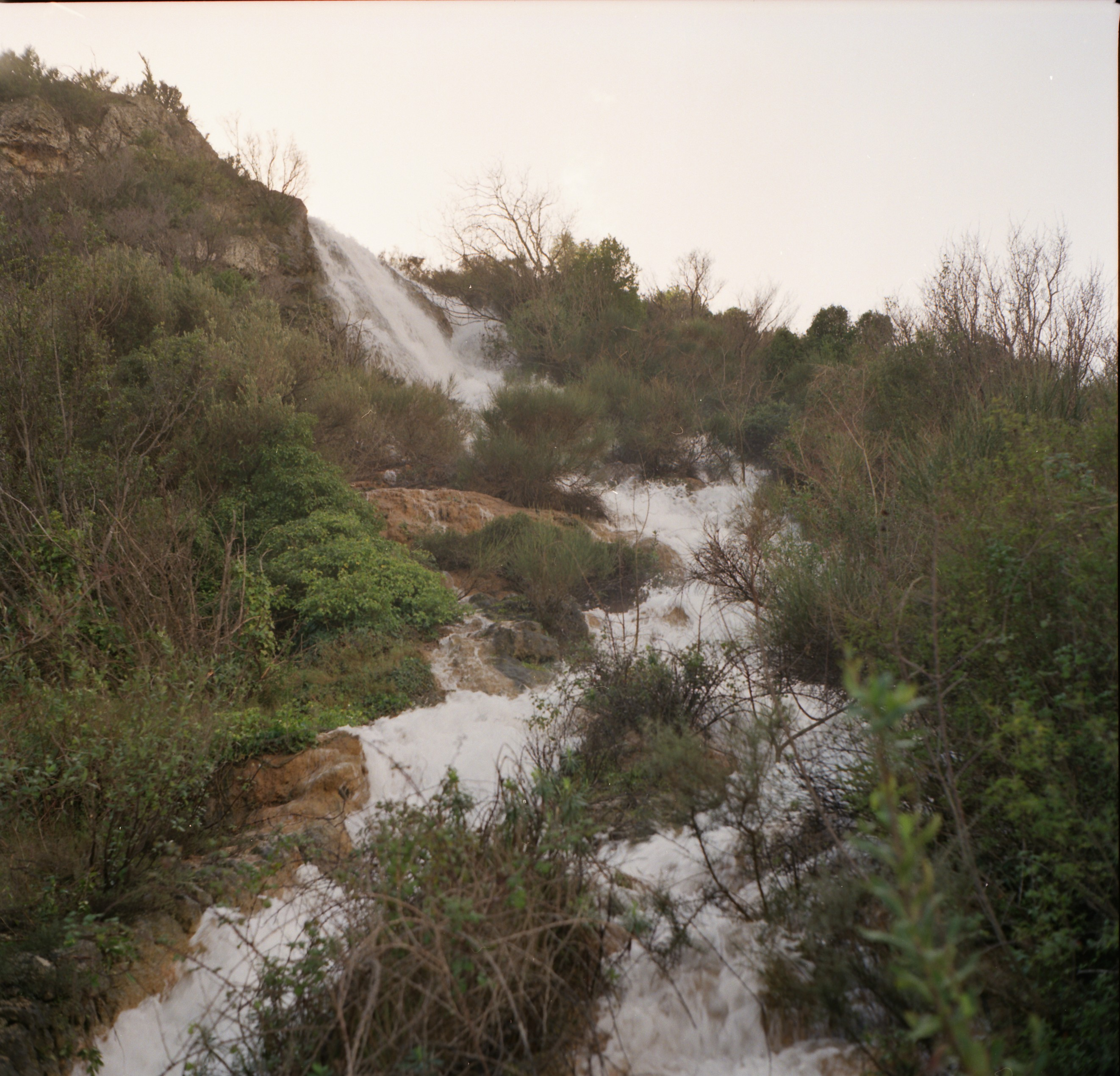 Cabrières (Hérault) - source intermittente de l'Estabel en 1996. Depuis cette date, la source n'a plus coulé.